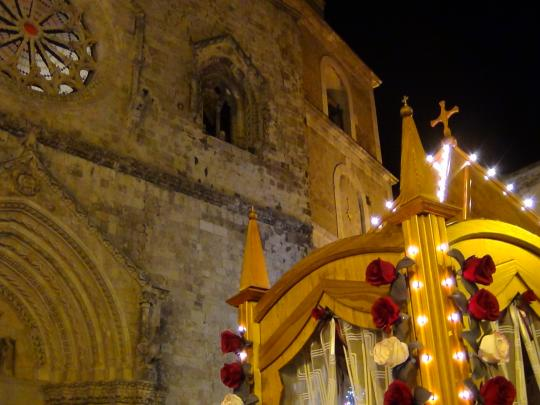 la cattedrale